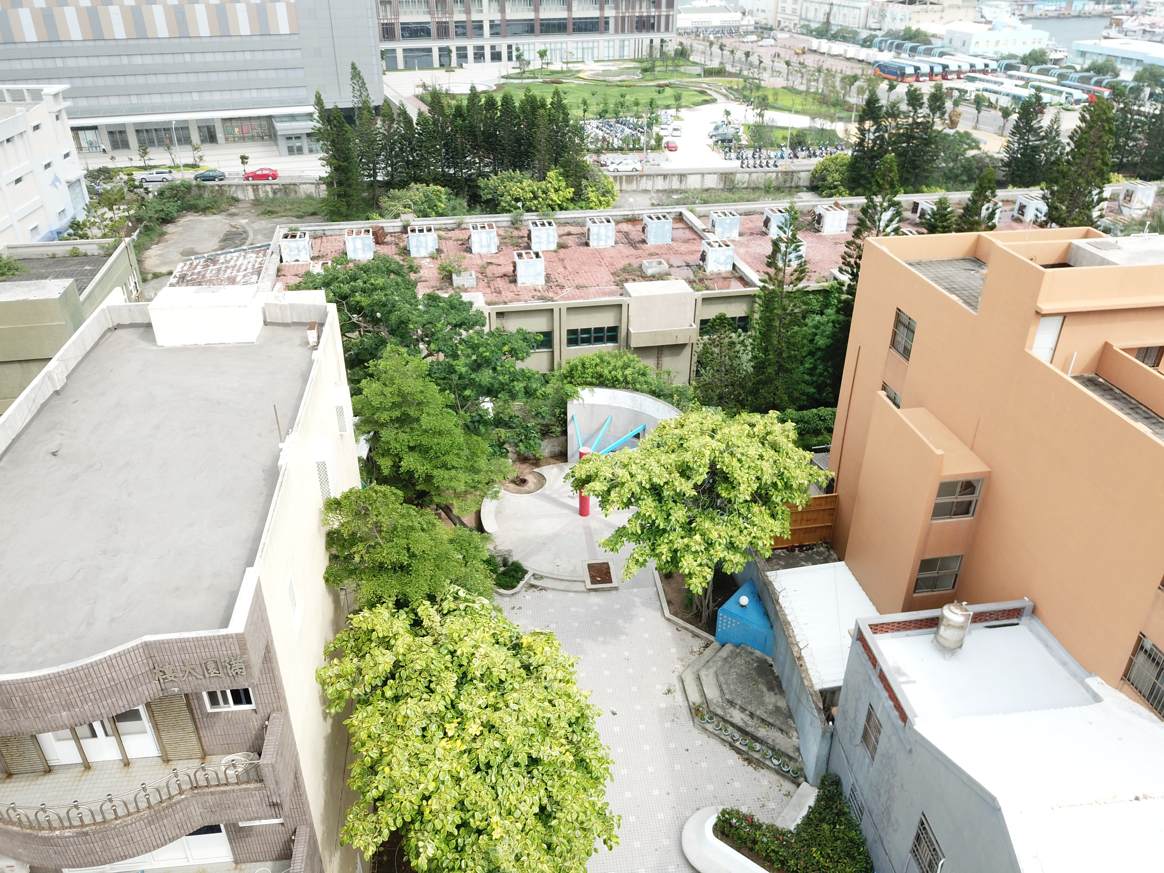 隆貴公園暨台電舊廠園區空拍圖